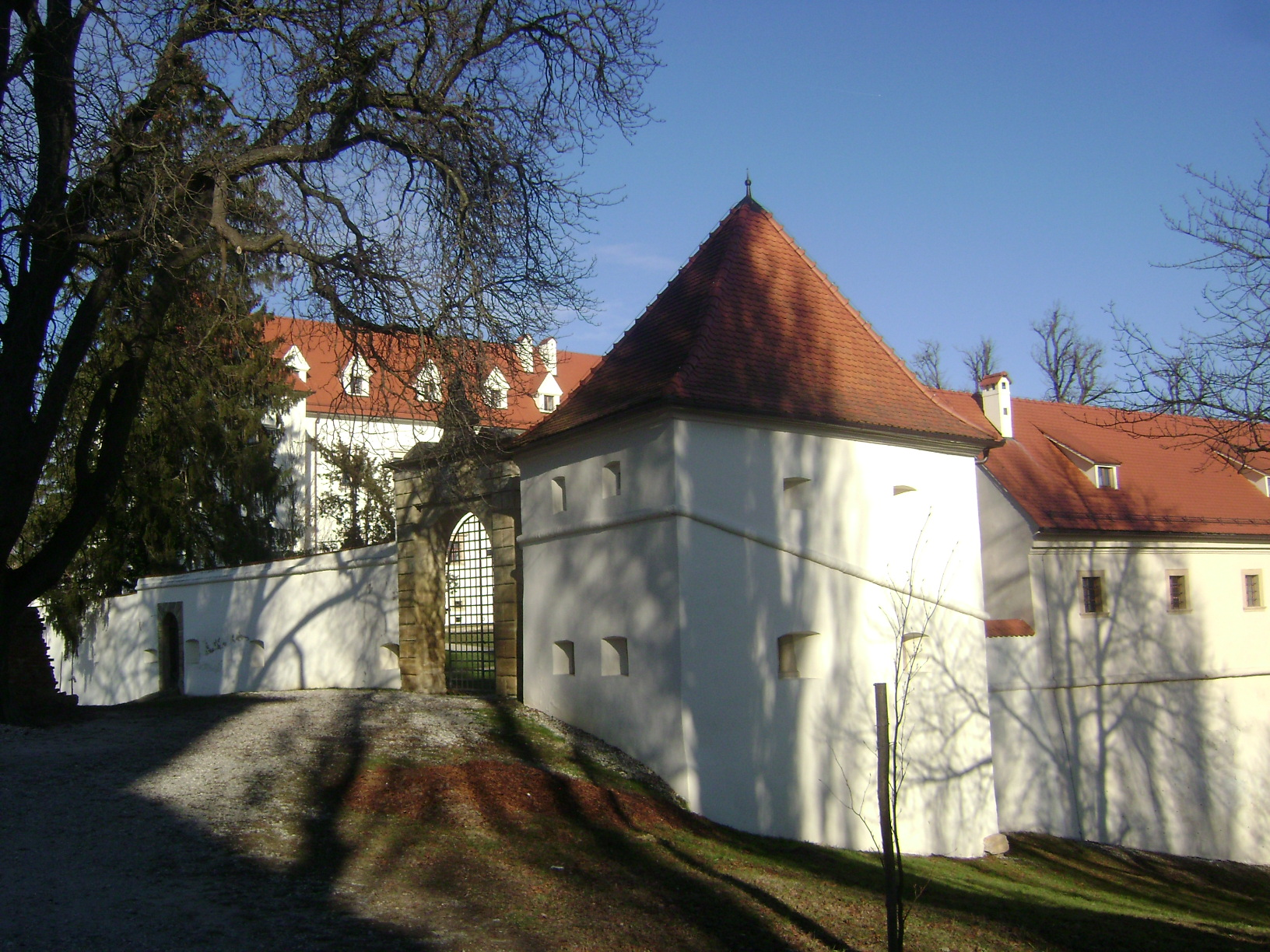 Grad Negova